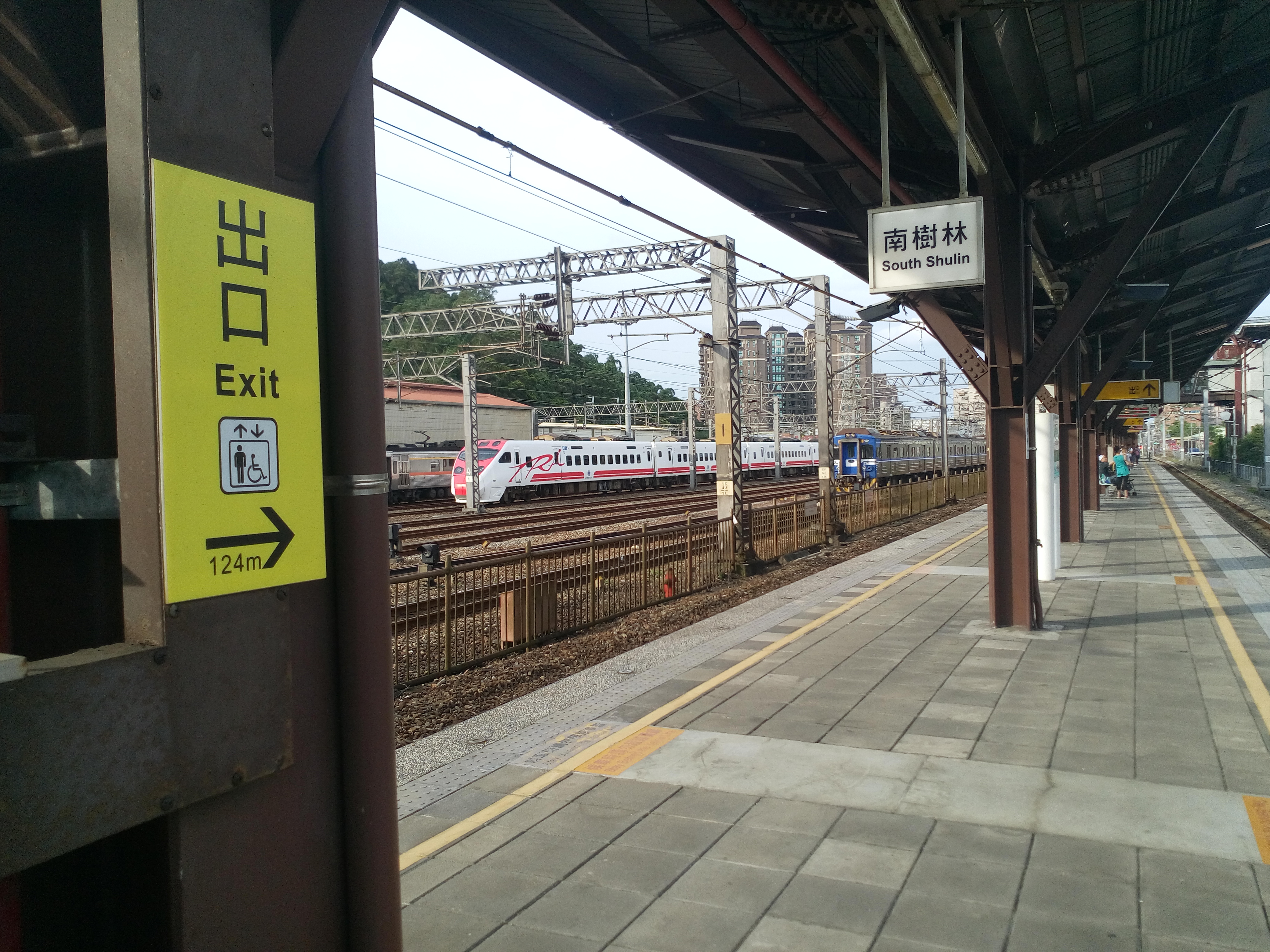 臺灣鐵路管理局南樹林車站第一月台及樹林調車場。